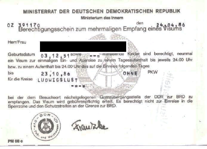 Mehrfach-Berechtigungsschein zum Empfang eines Visums für den grenznahen Verkehr